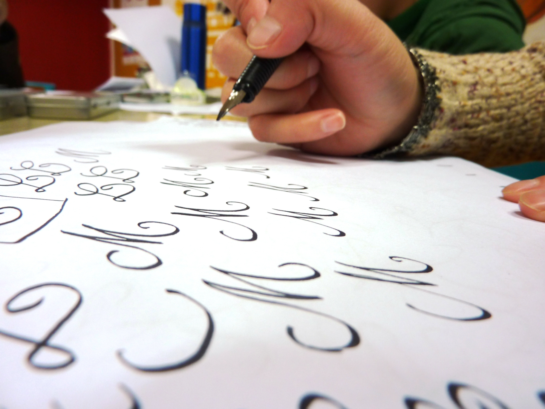 Calligraphie latine à l'Alliance française de Wuhan (